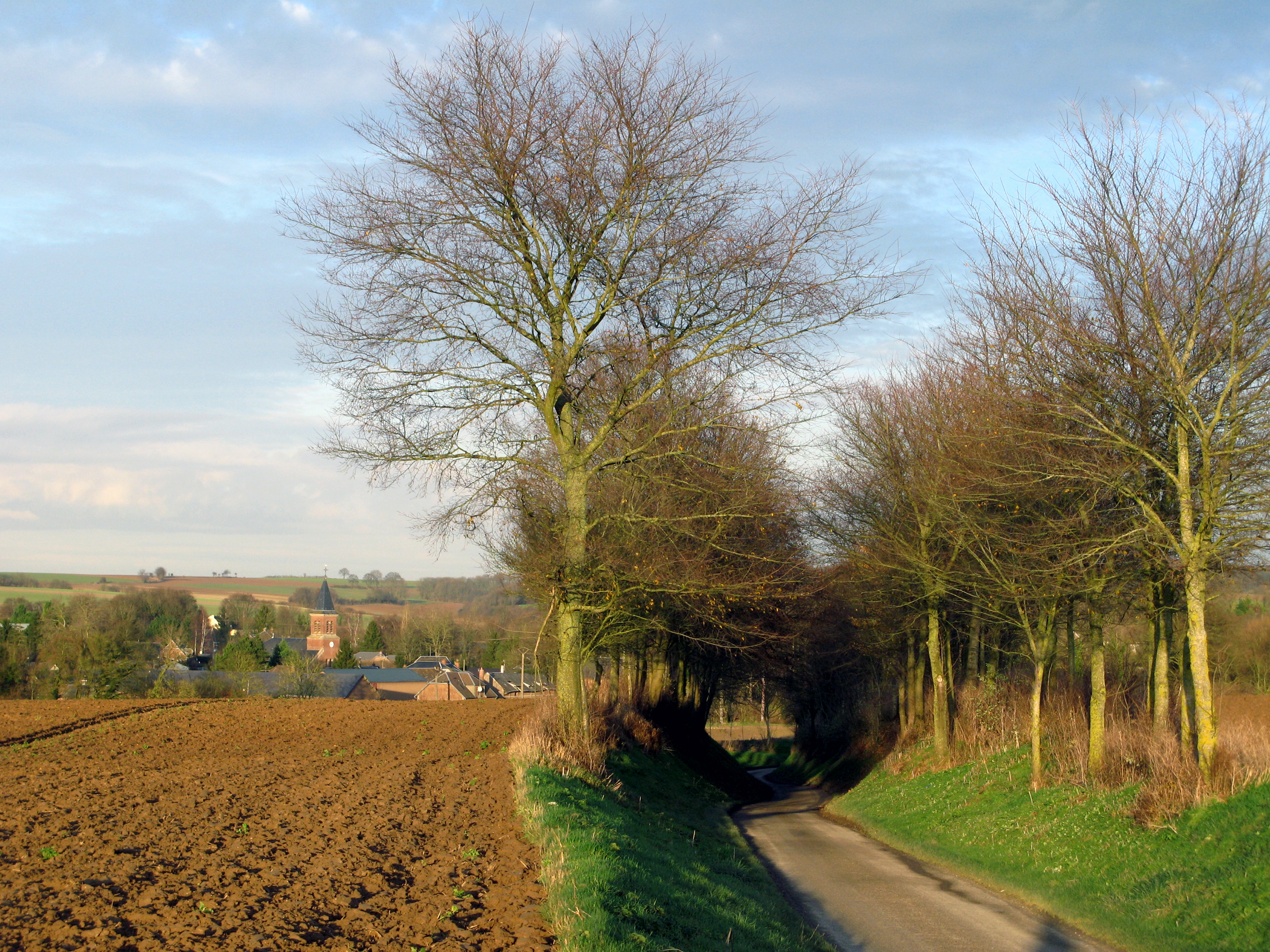 Jeancourt (Aisne, France) - Vue sur le village en arrivant de Vendelles. .